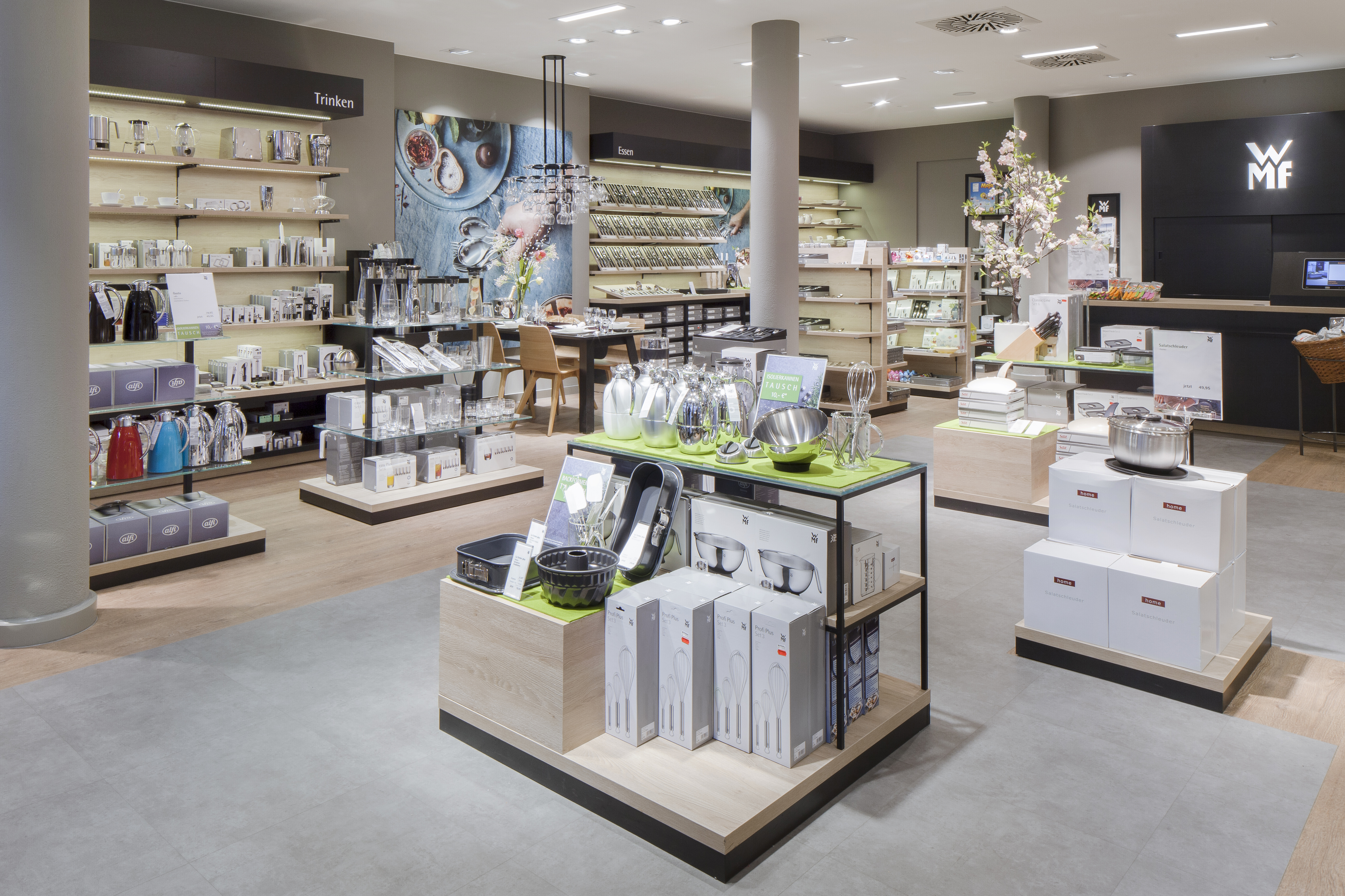 WMF-Filiale_2